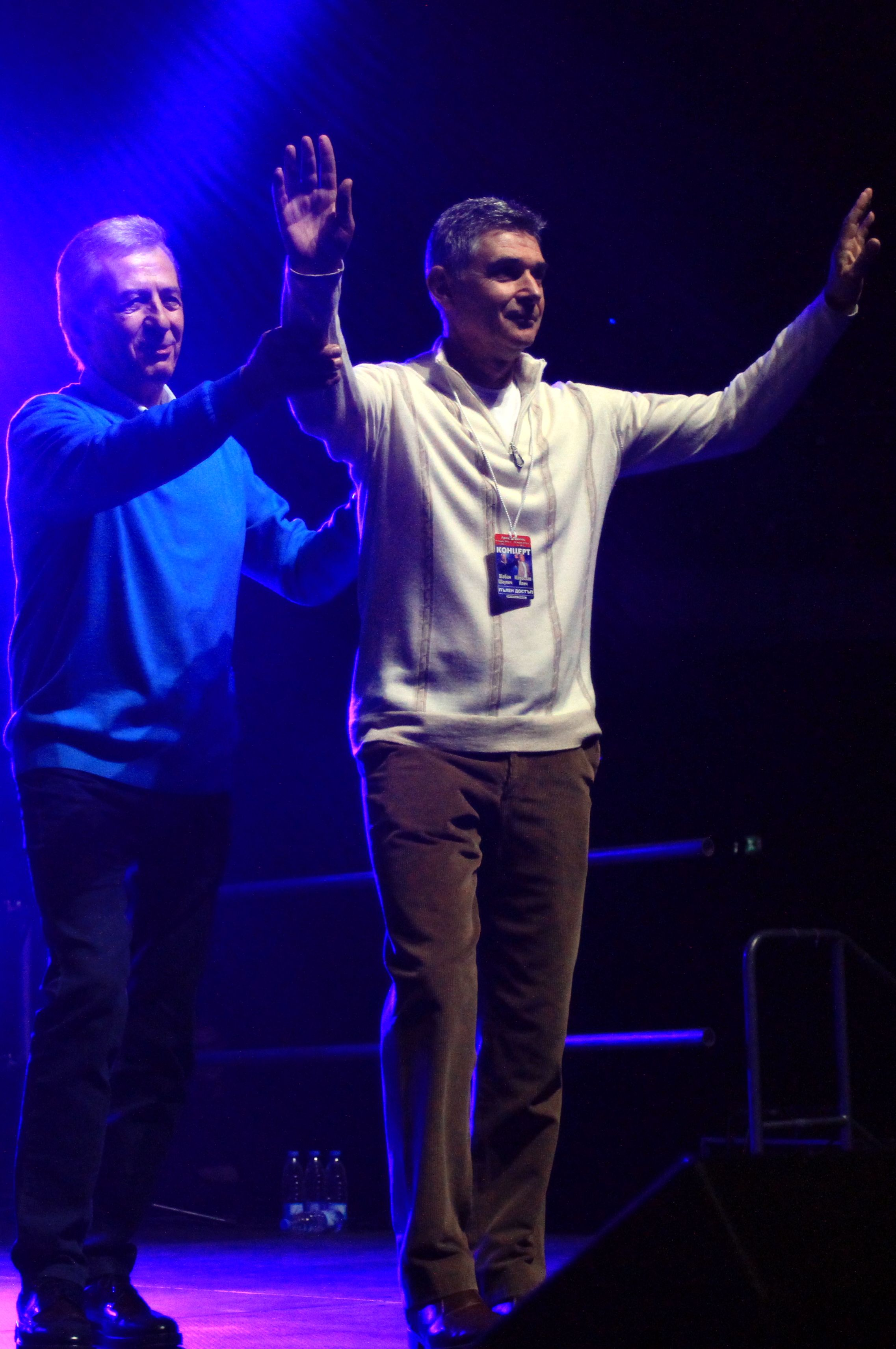 Венцислав Рангелов и Мирослав Илич